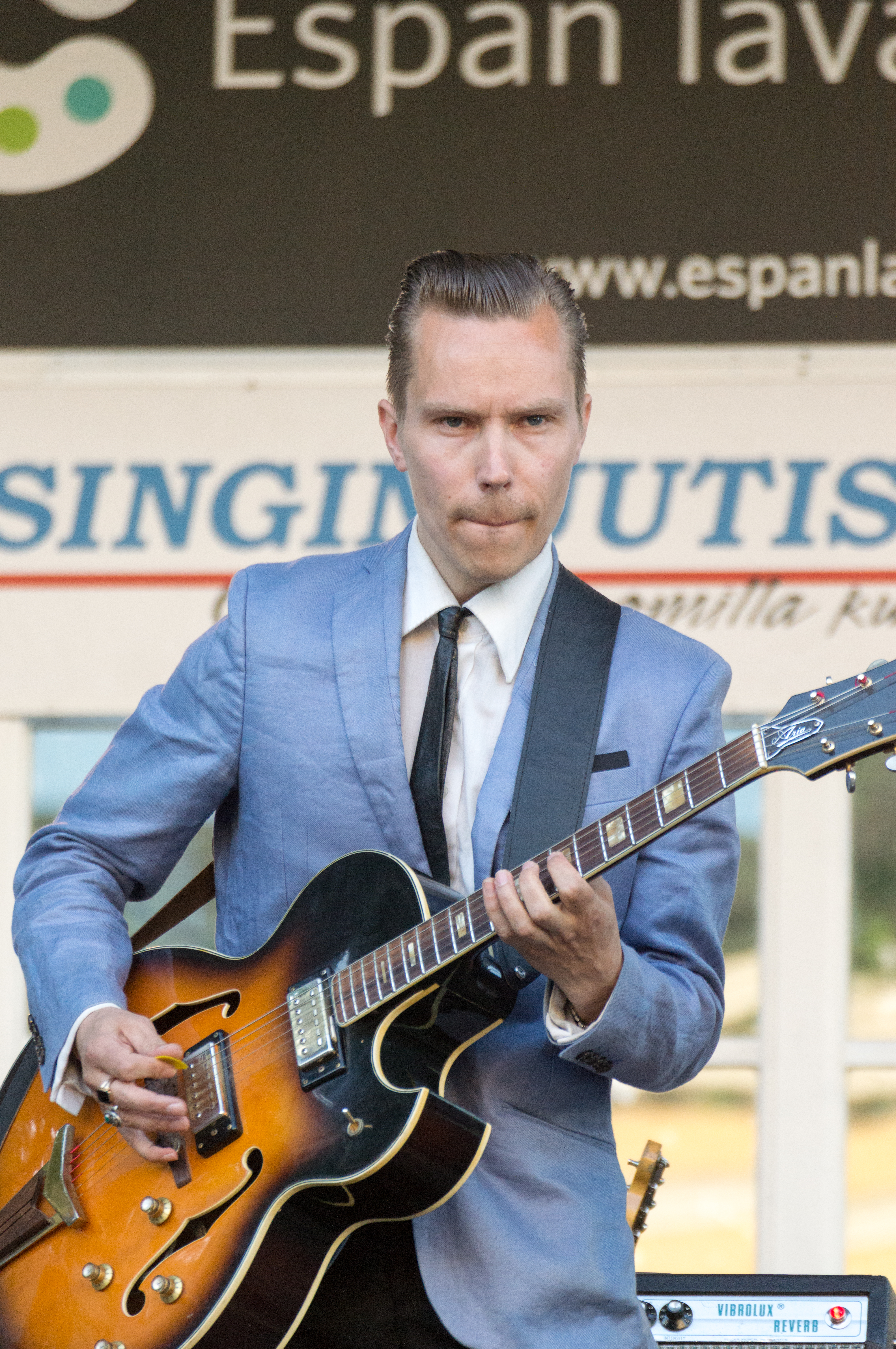 Rocka Merilahti suomalainen kitaristi